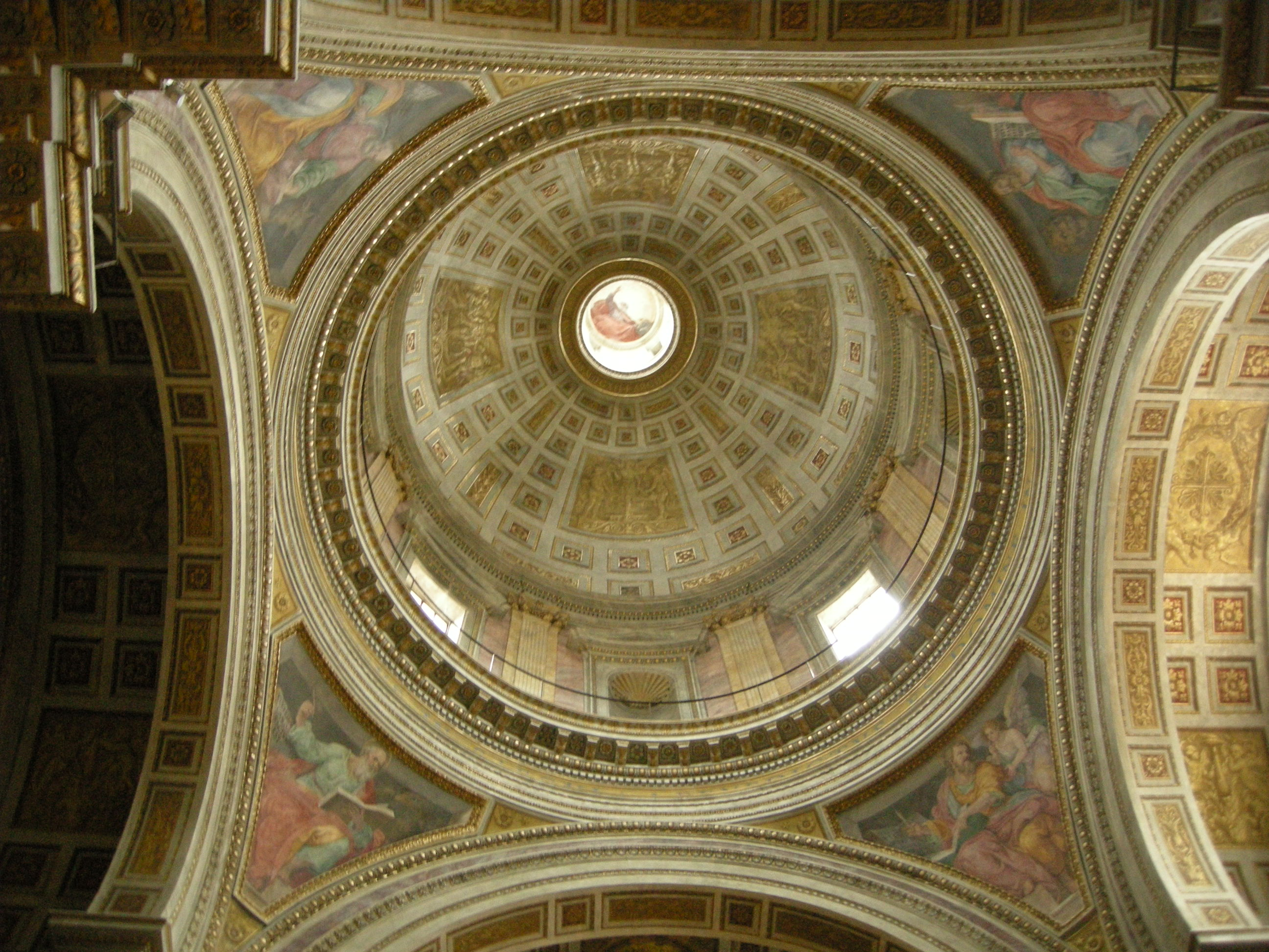 Santissima trinità dei pellegrini, interno 03 cupola